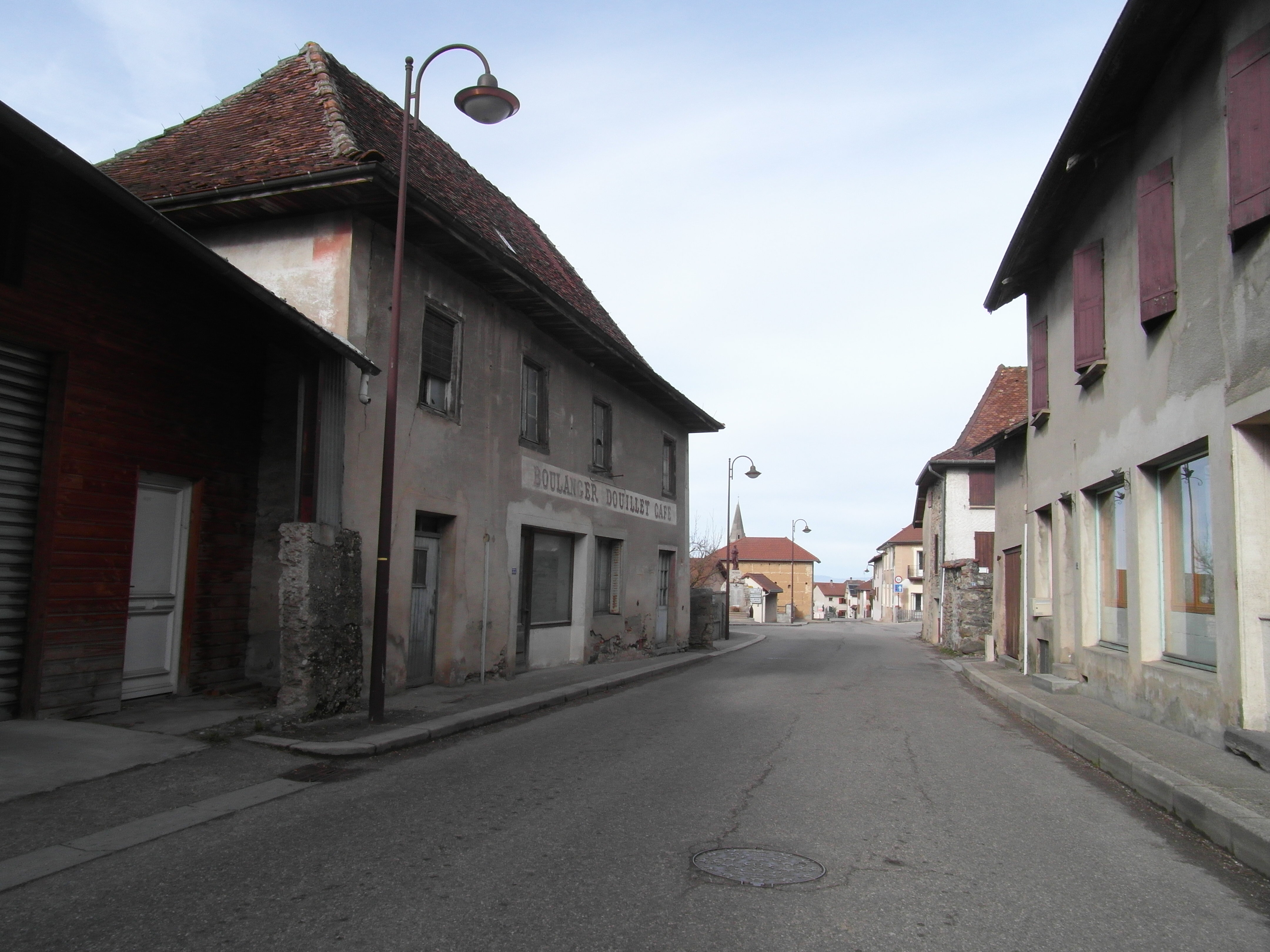 autre rue de Bizonnes en mars 2019